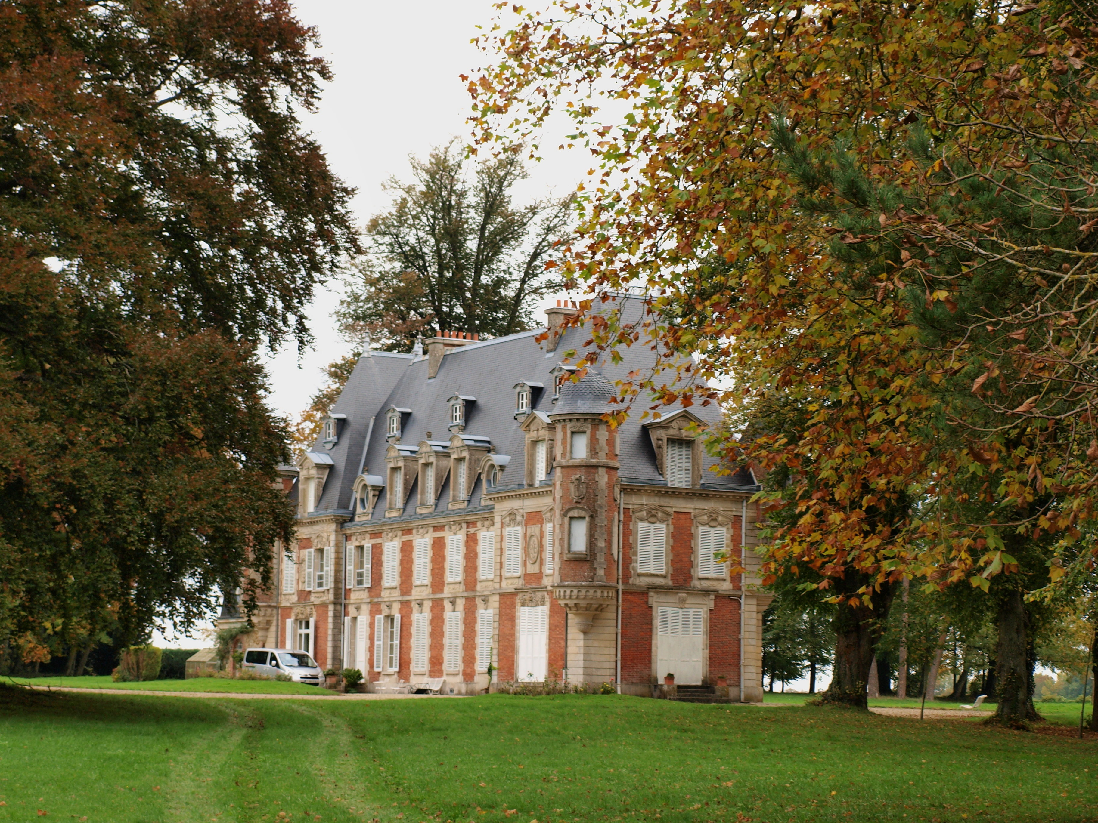 Bethon (Aisne, France) ; château